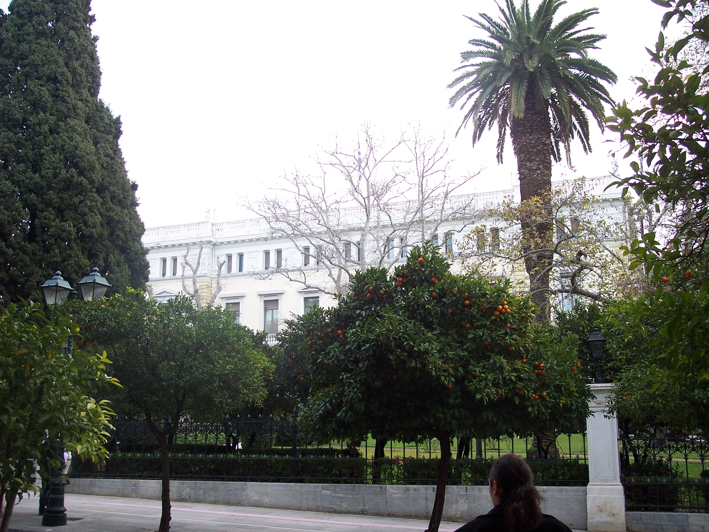 Palais présidentiel d'Athènes avec vue sur les jardins